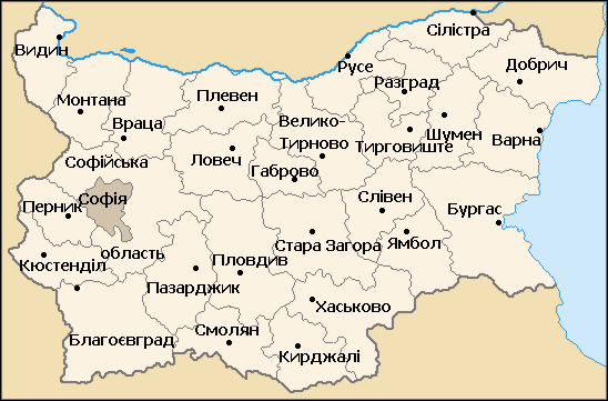 Області Болгарії: Карта Болгарії